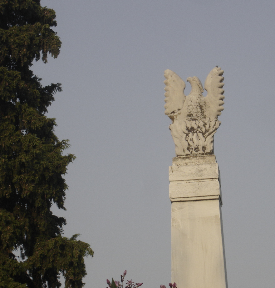 Monument in Sevasti, Pieria.